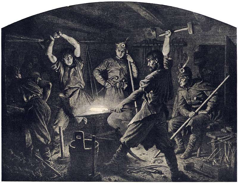 Cykl "Polonia", III. Kucie kos by Artur Grottger